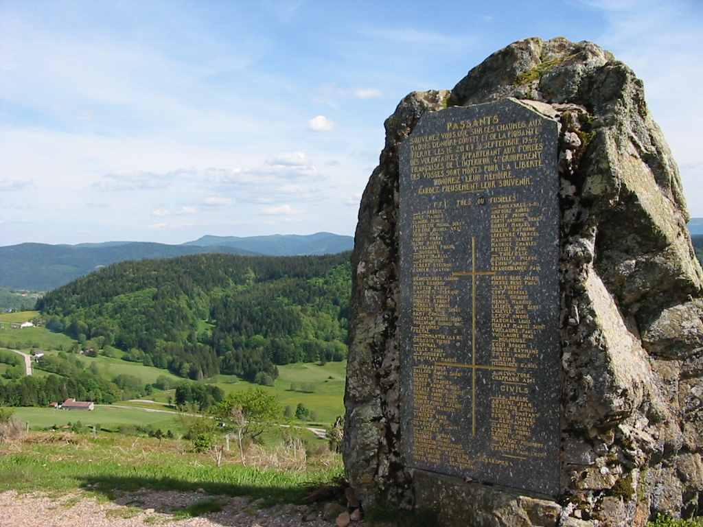 Monument des fusillés de la Résistance à la Piquante-Pierre Commune de Basse-sur-le-Rupt, département des Vosges, France Photographie personnelle prise le 7 juin 2006. Copyright © Christian Amet